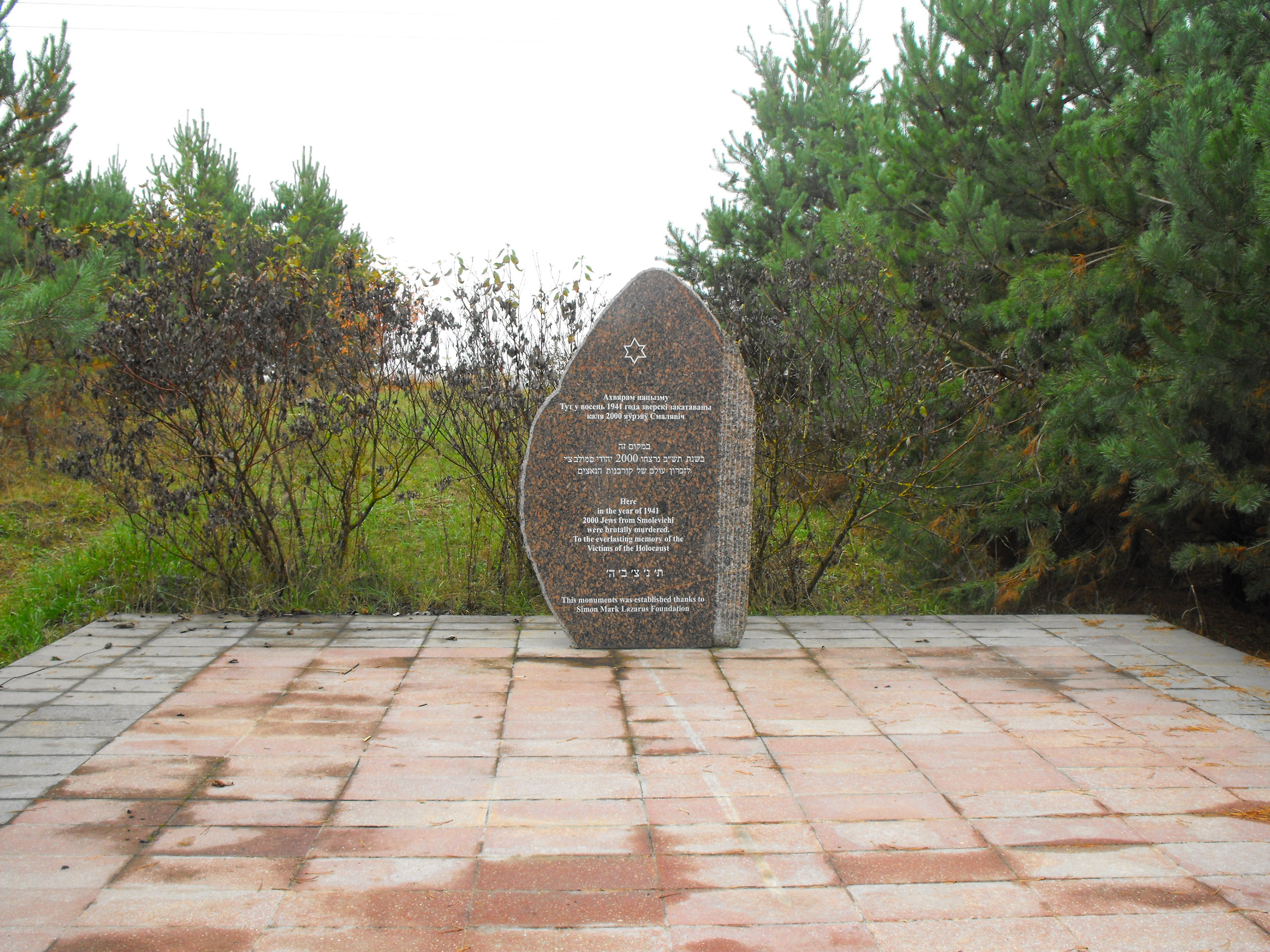 Памятник на месте убийства нацистами и их пособниками евреев - узников Смолевичского гетто осенью 1941 года. Находится недалеко от выезда из Смолевич с улицы Первомайской в 50 метрах справа от дороги.